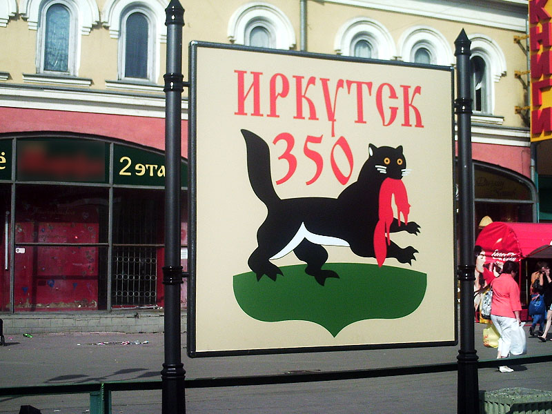 Специальные наклейки к 350-летнему юбилею Иркутска